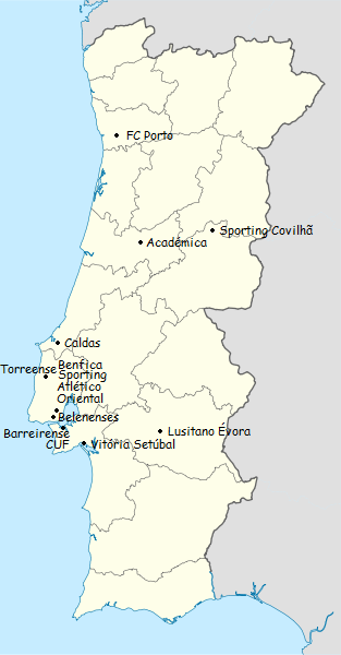 Carta dos clubes participantes do campeonato de portugal de futebol de primeira divisao 1956-1957